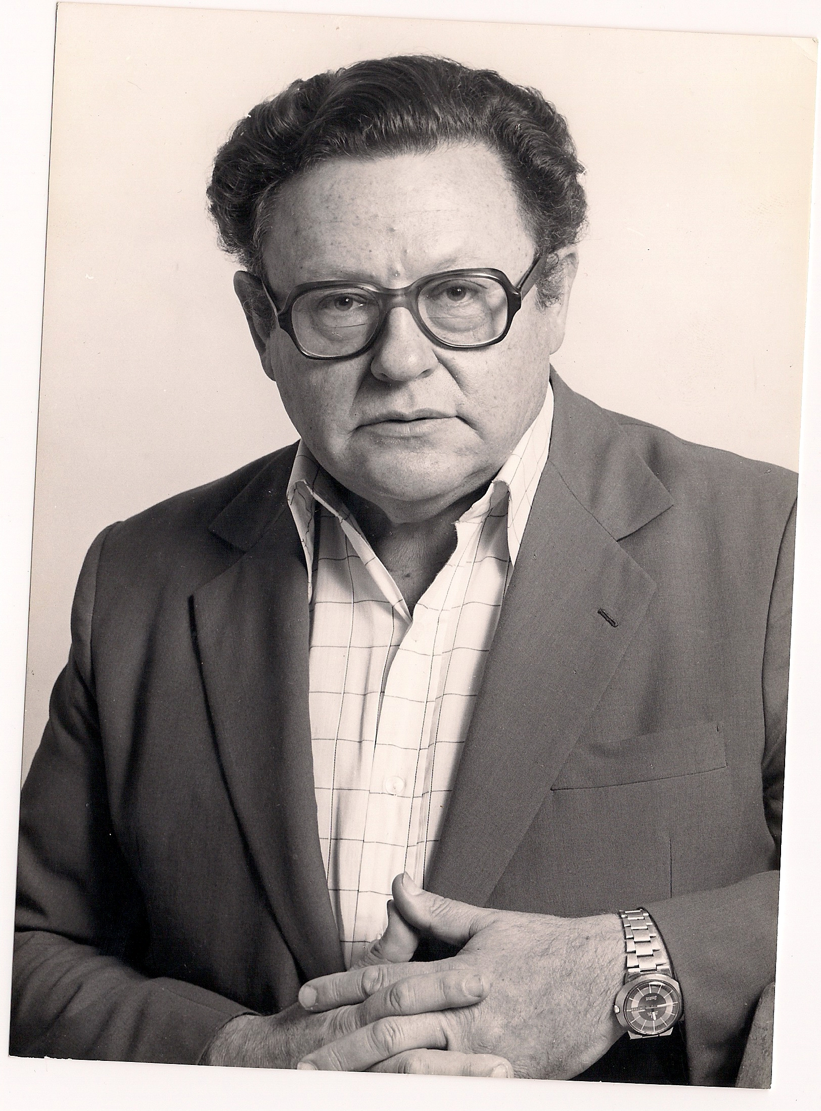 תמונה של אבא